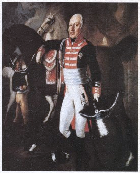 Graf Ludwig Kolb von Wartenberg (1752–1818), regierender Graf von Wartenberg 1784–1801, Graf von Wartenberg-Roth 1803– † 1818, der letzte Graf aus dem Hause Kolb von Wartenberg.